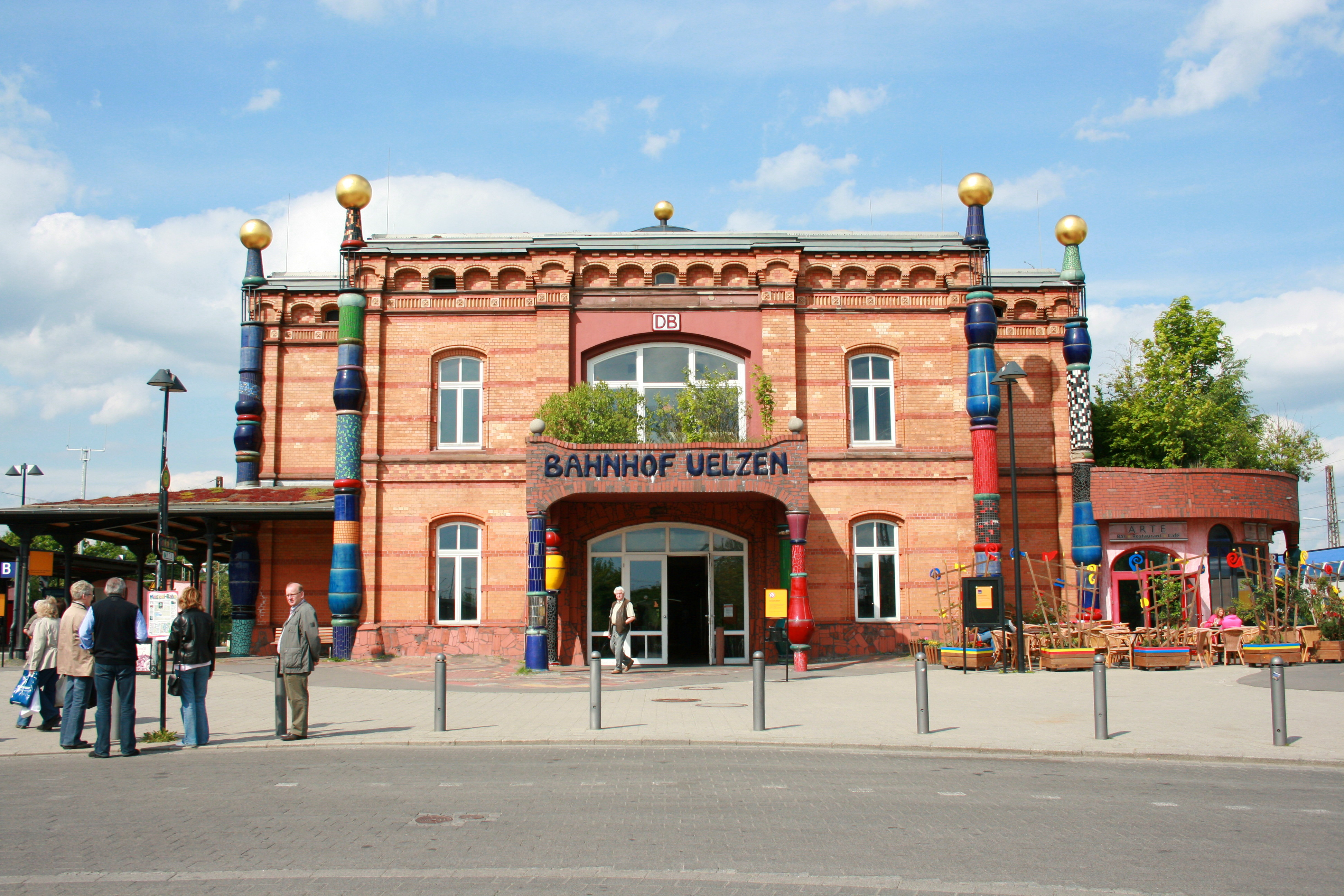 Hundertwasserbahnhof Uelzen.